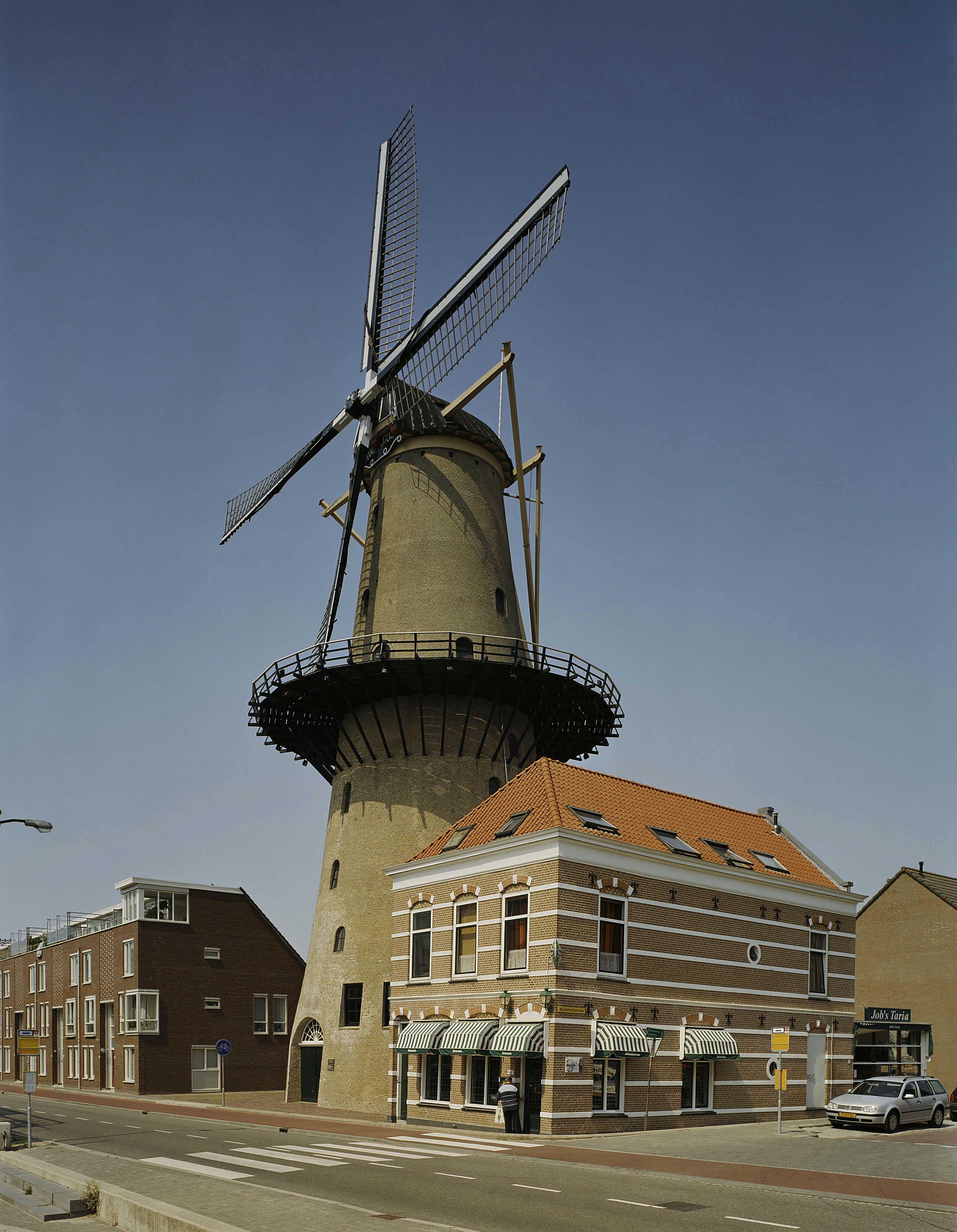 Kyck over den Dyck: Overzicht (opmerking: Gefotografeerd voor Monumenten In Nederland Zuid-Holland)